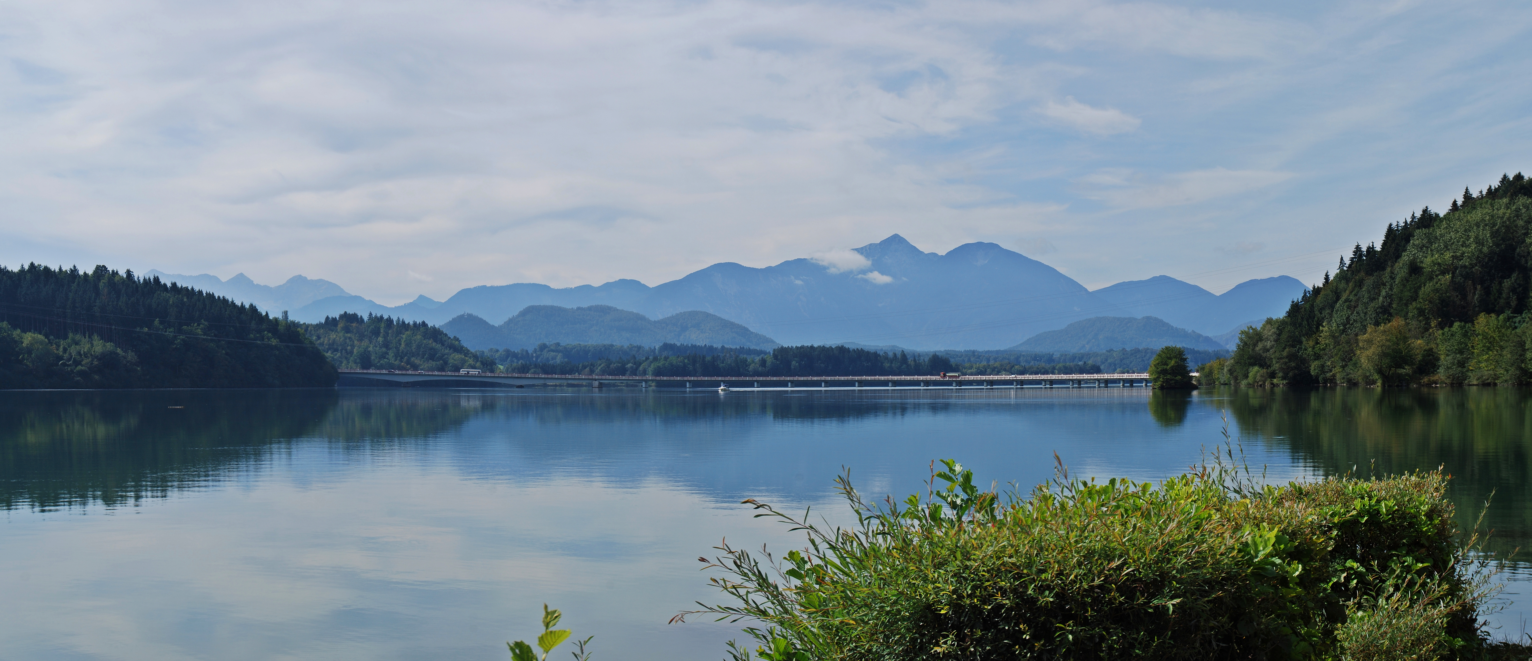 Blick über den Völkermarkter Stausee in Südkärnten.